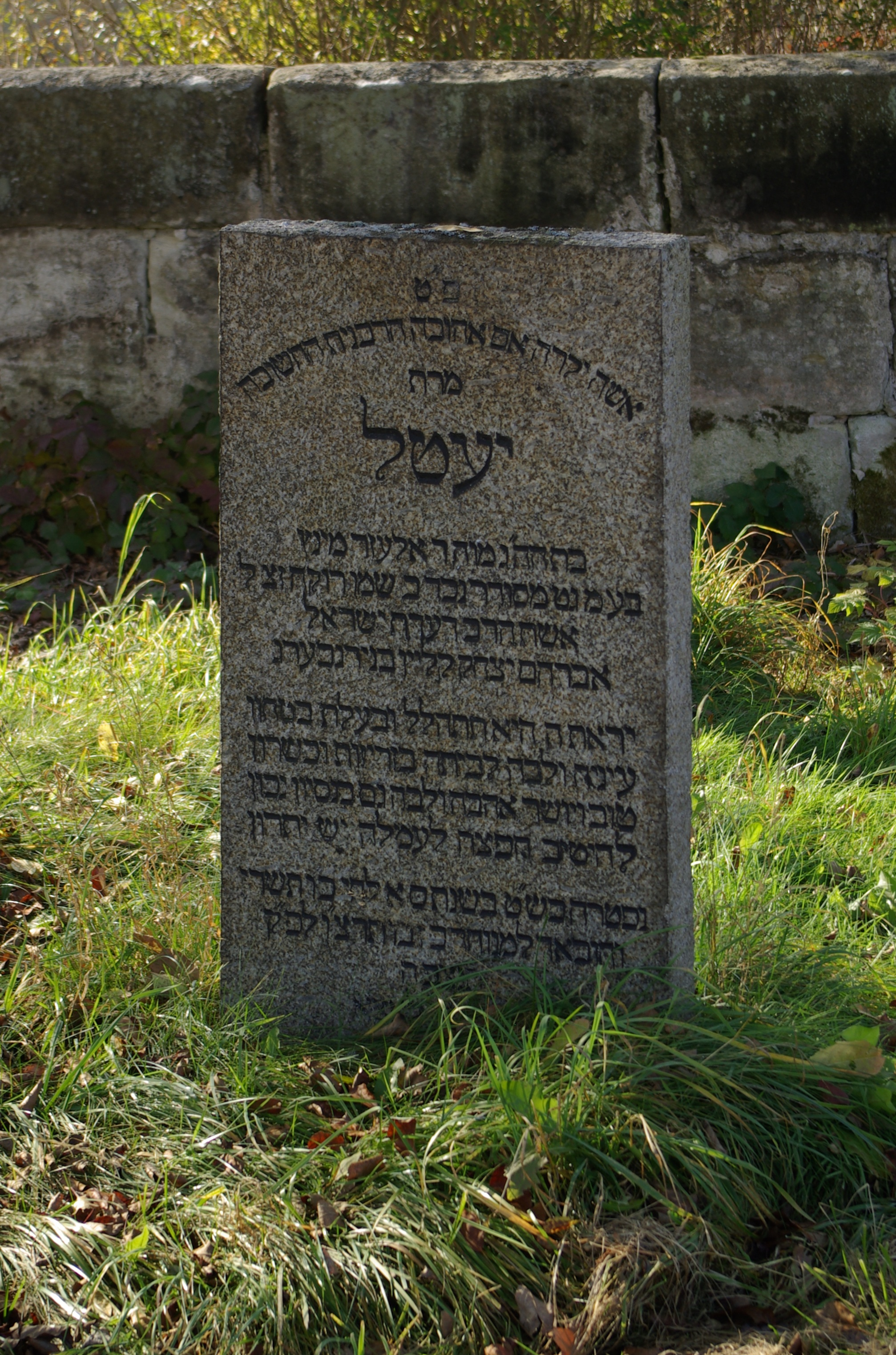 Jüdischer Friedhof in Georgensgmünd, das letzte Grab dem Jahr 1948.